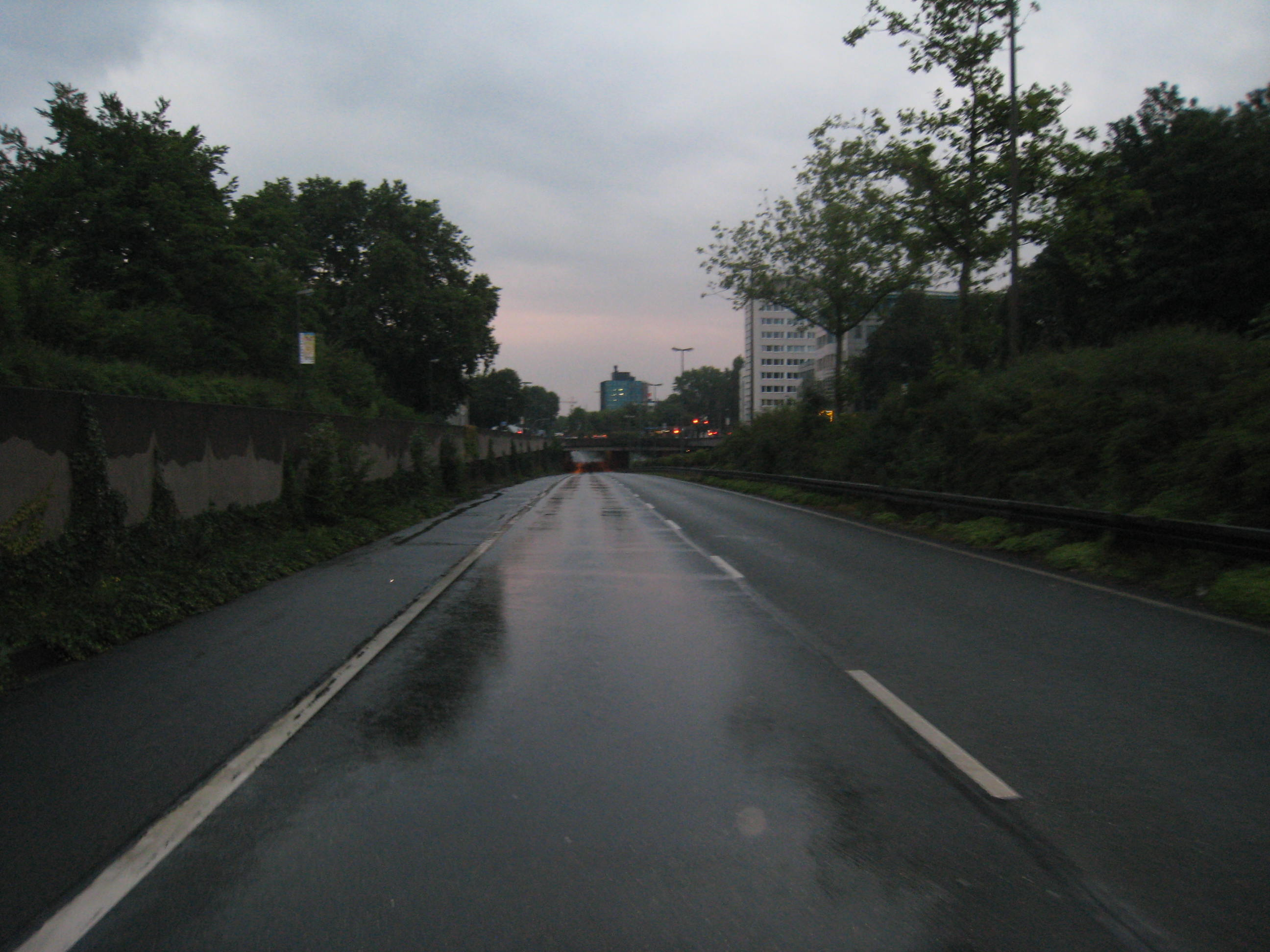 Der für den Autoverkehr gesperrte Westfalendamm Dortmund am Vorabend der Loveparade 2008